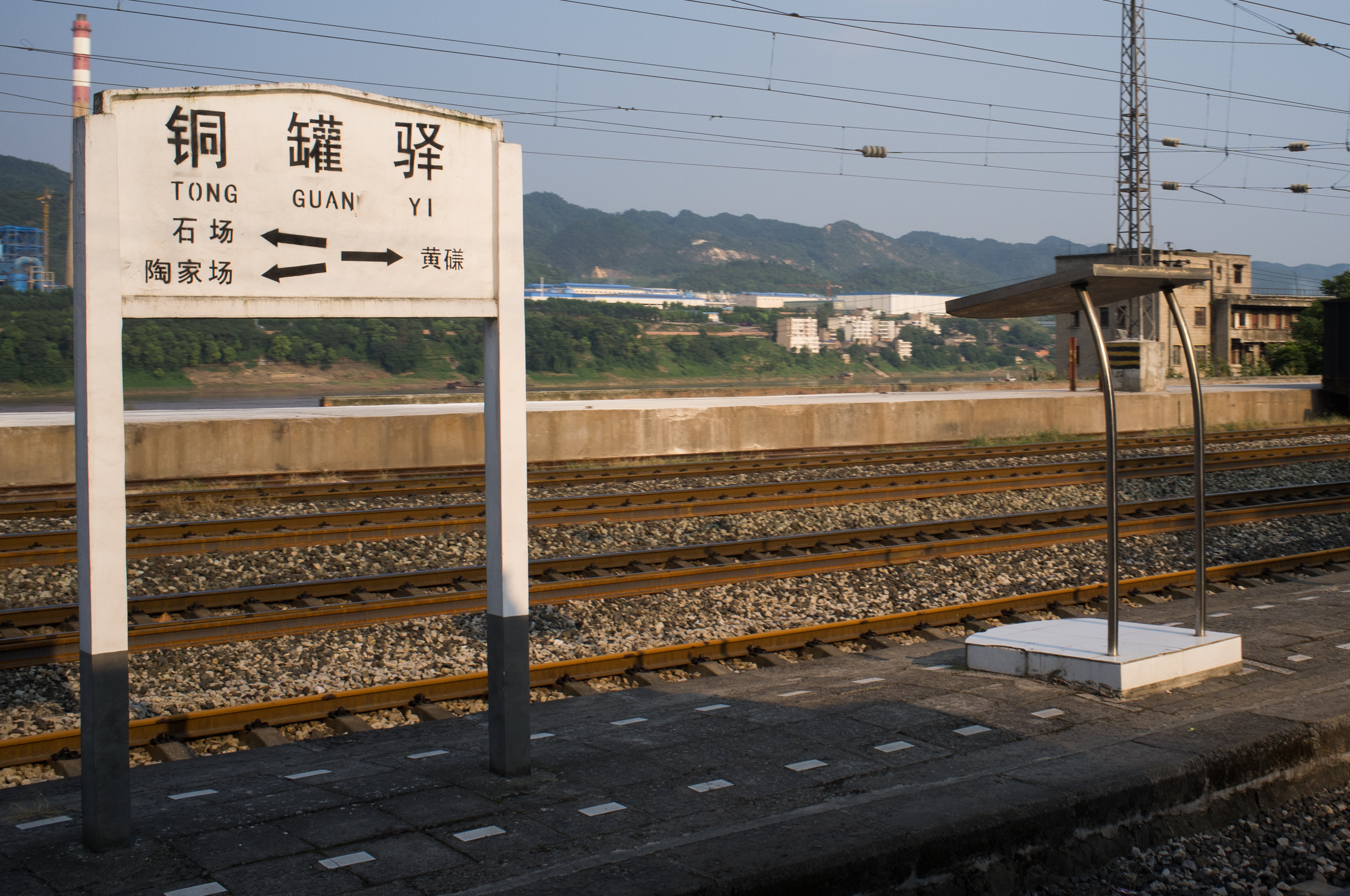 中文（中国大陆）: 成渝铁路铜罐驿站